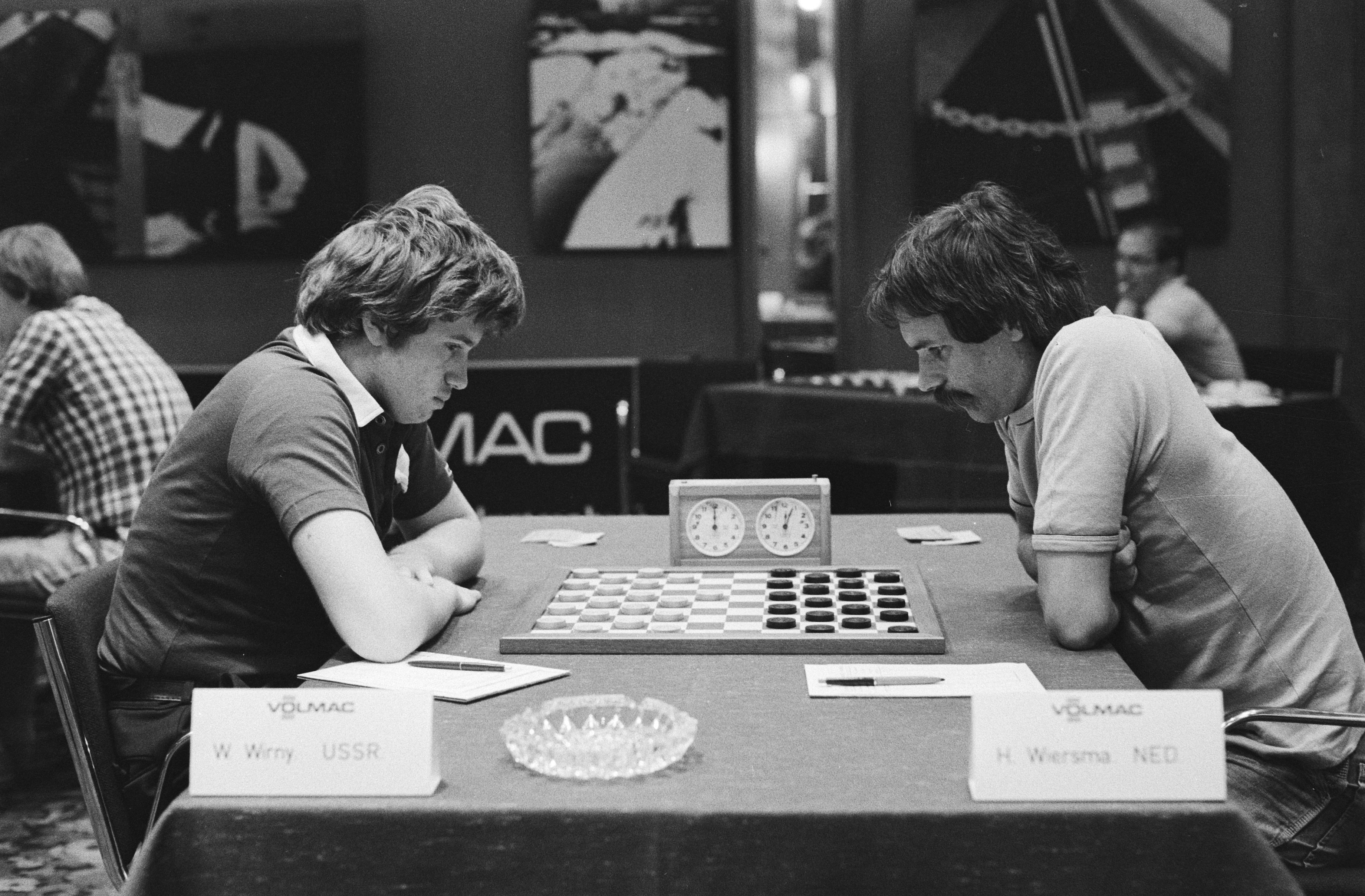 Wirny tegen Wiersma (r)